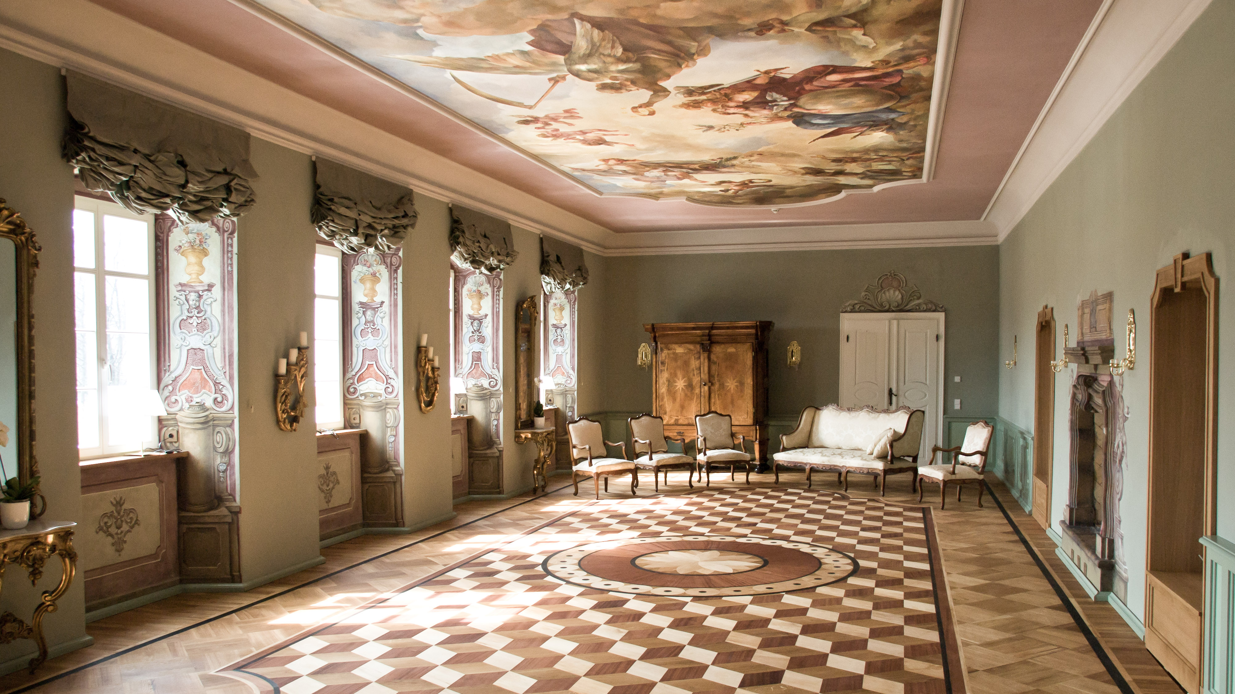 Schloss Wernersdorf - Blick in den historischen Ballsaal